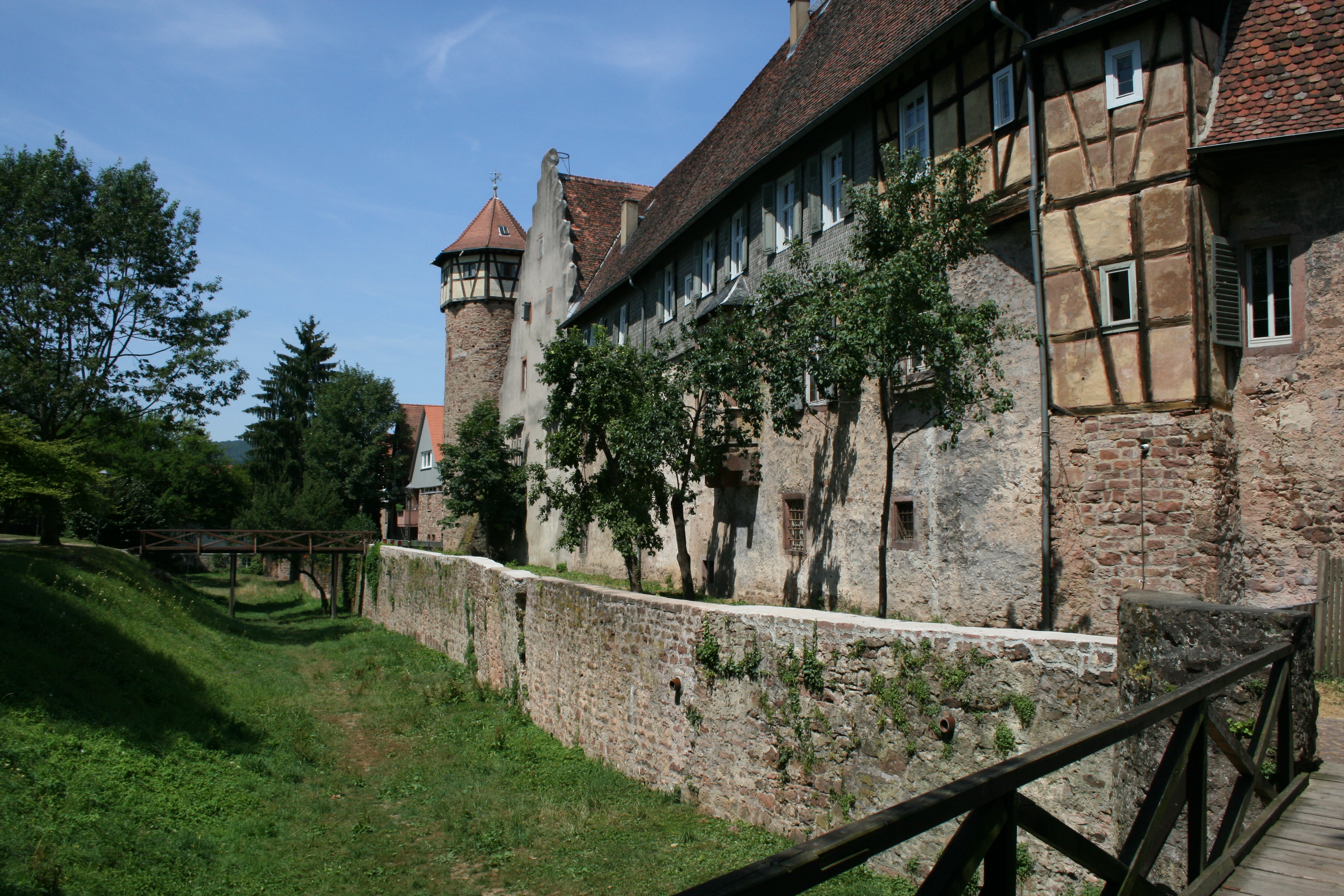 Michelstadt im Odenwald, Stadtgraben und Diebsturm der Stadtmauer, Rückseite der Kellerei.